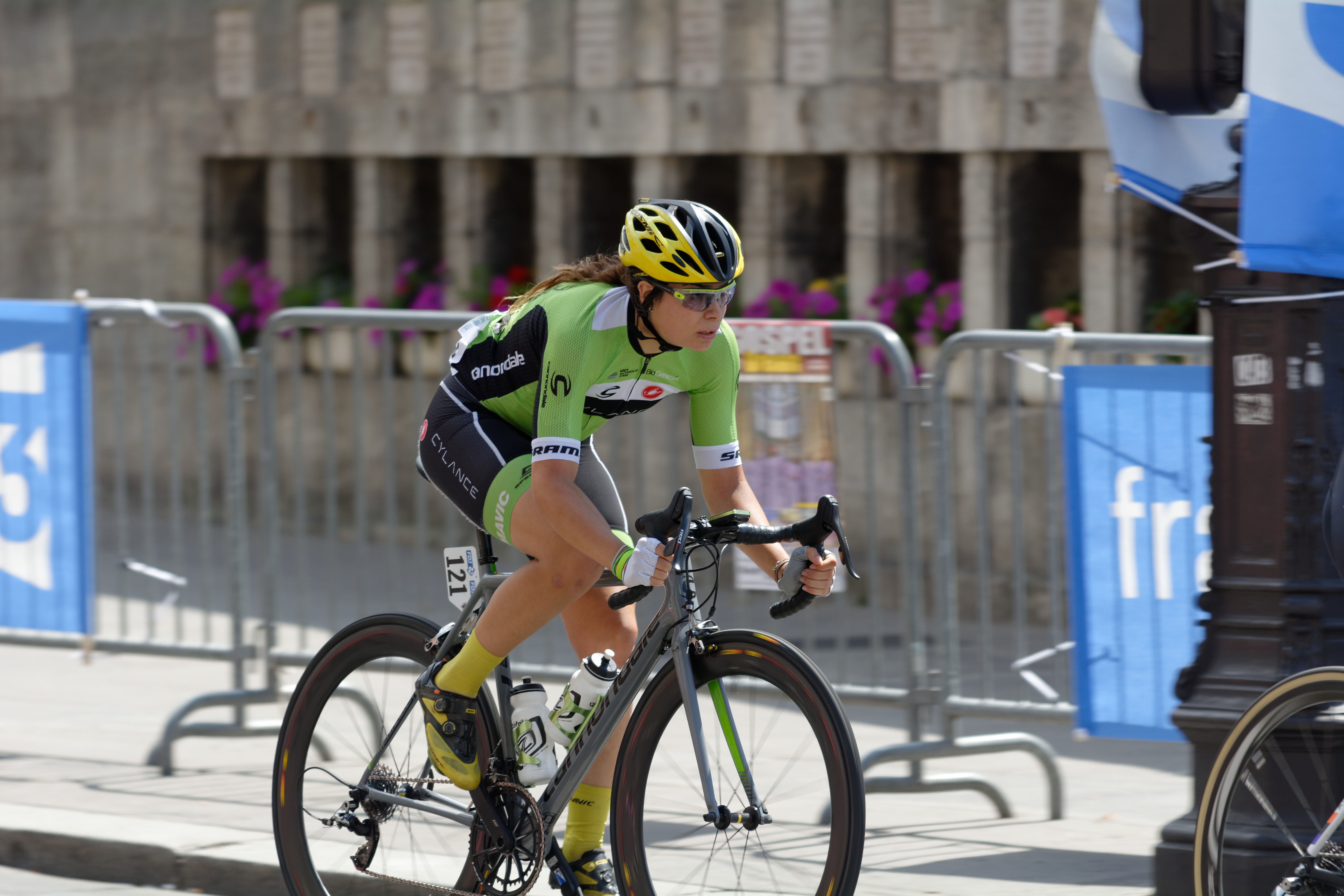 D71_9347_DxO